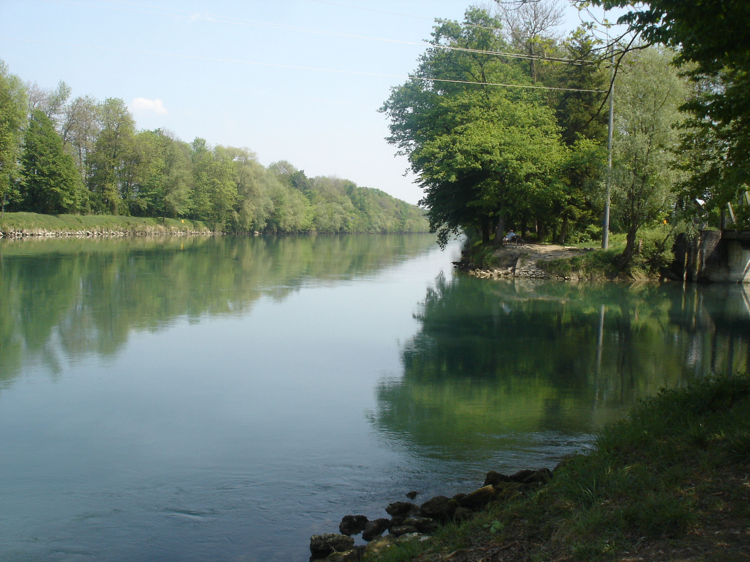 Hagneckkanal bei Walperswil, auf der rechten Seite ist noch die Einmündung des Unterwasserkanals des Kraftwerkes Kallnach zu sehen